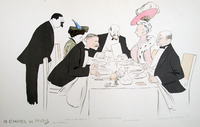 Scene a l´Hotel de Paris vue par SEM